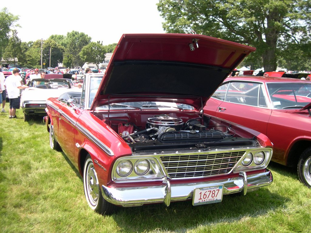 1964 Studebaker Daytona Convertible